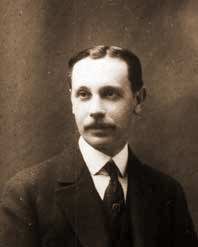 Portrait de SImon Méry un des fondateurs des voitures Turcat-Méry